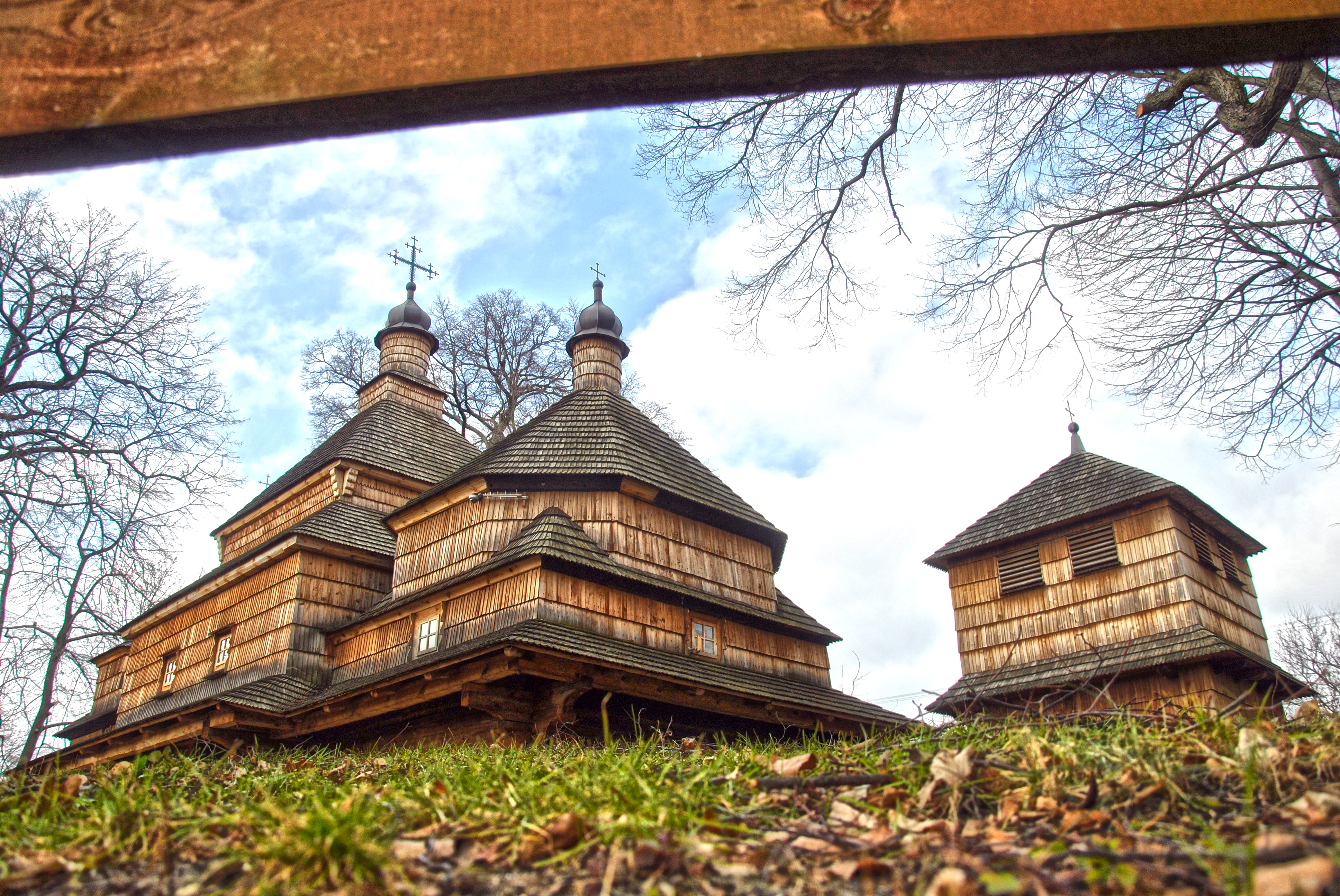 Cerkiew greckokatolicka w Gorajcu